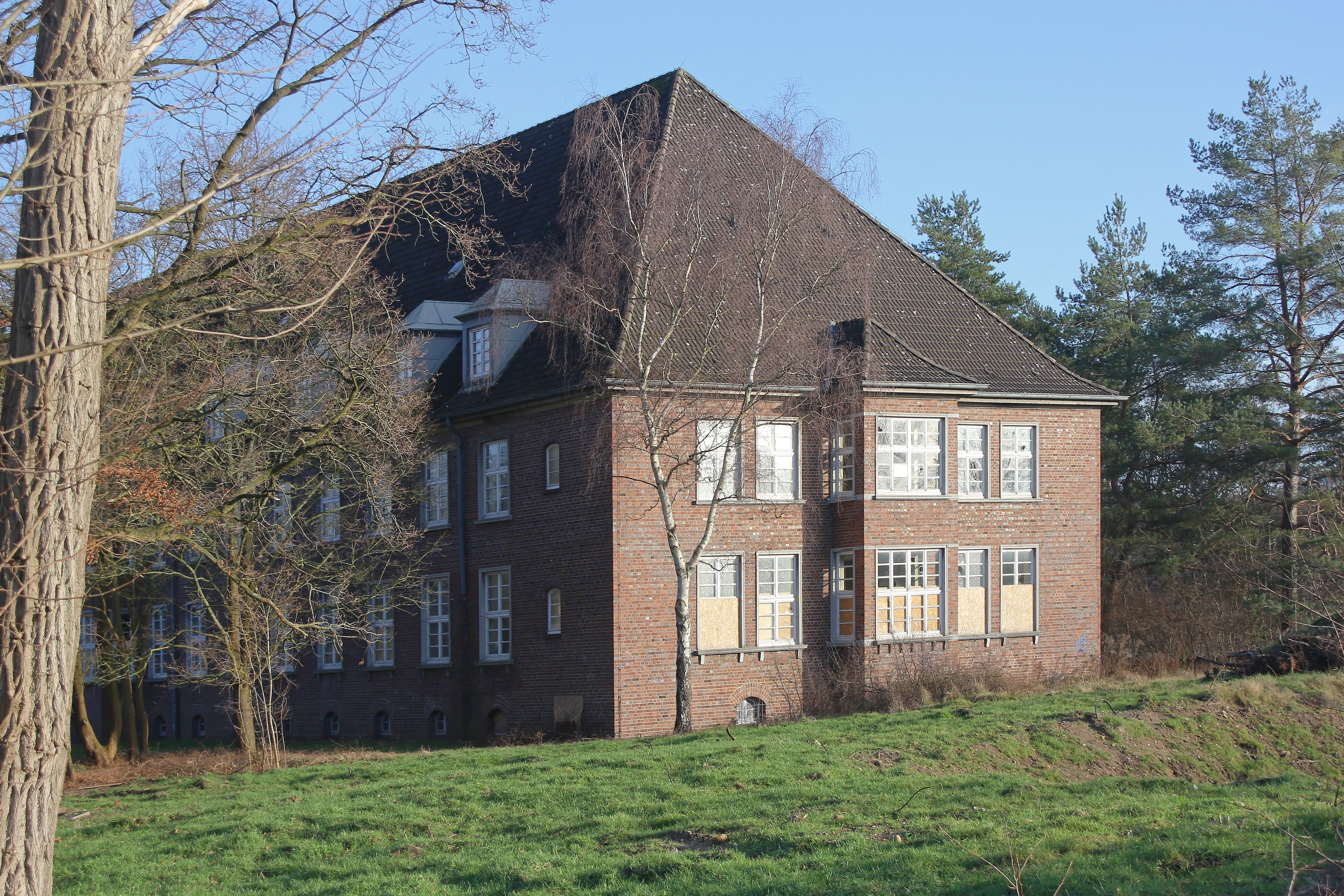 ehemalige Röttger-Kaserne Hamburg-Neugraben-Fischbek, Unterkunftsgebäude aus den 1930er-Jahren